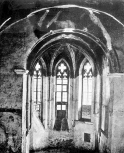 Pravděpodobně jediné dochované foto interiéru zaniklého kostela svatého Mikuláše v Brně.